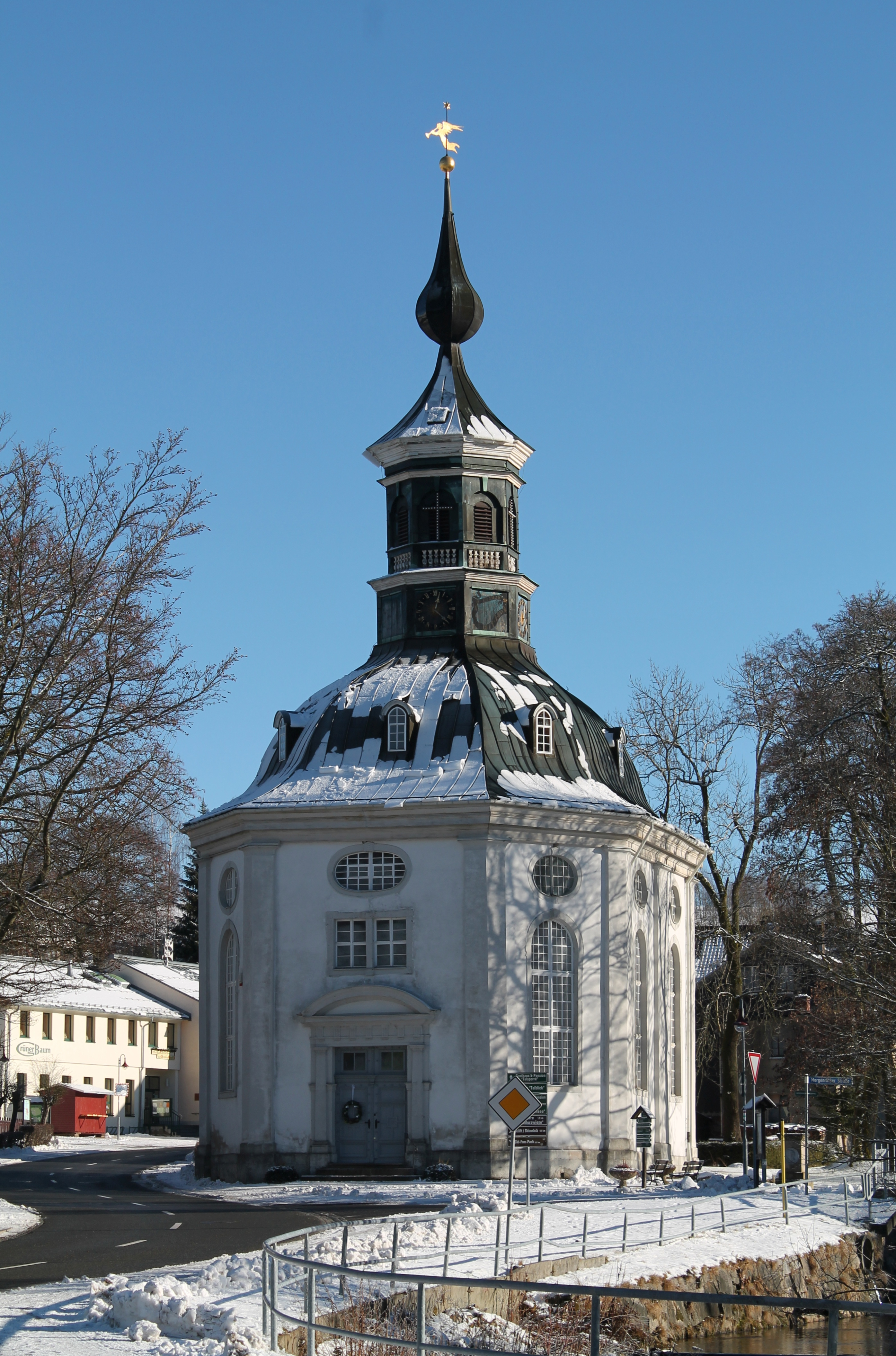 Trinitatiskirche Carlsfeld im Winter